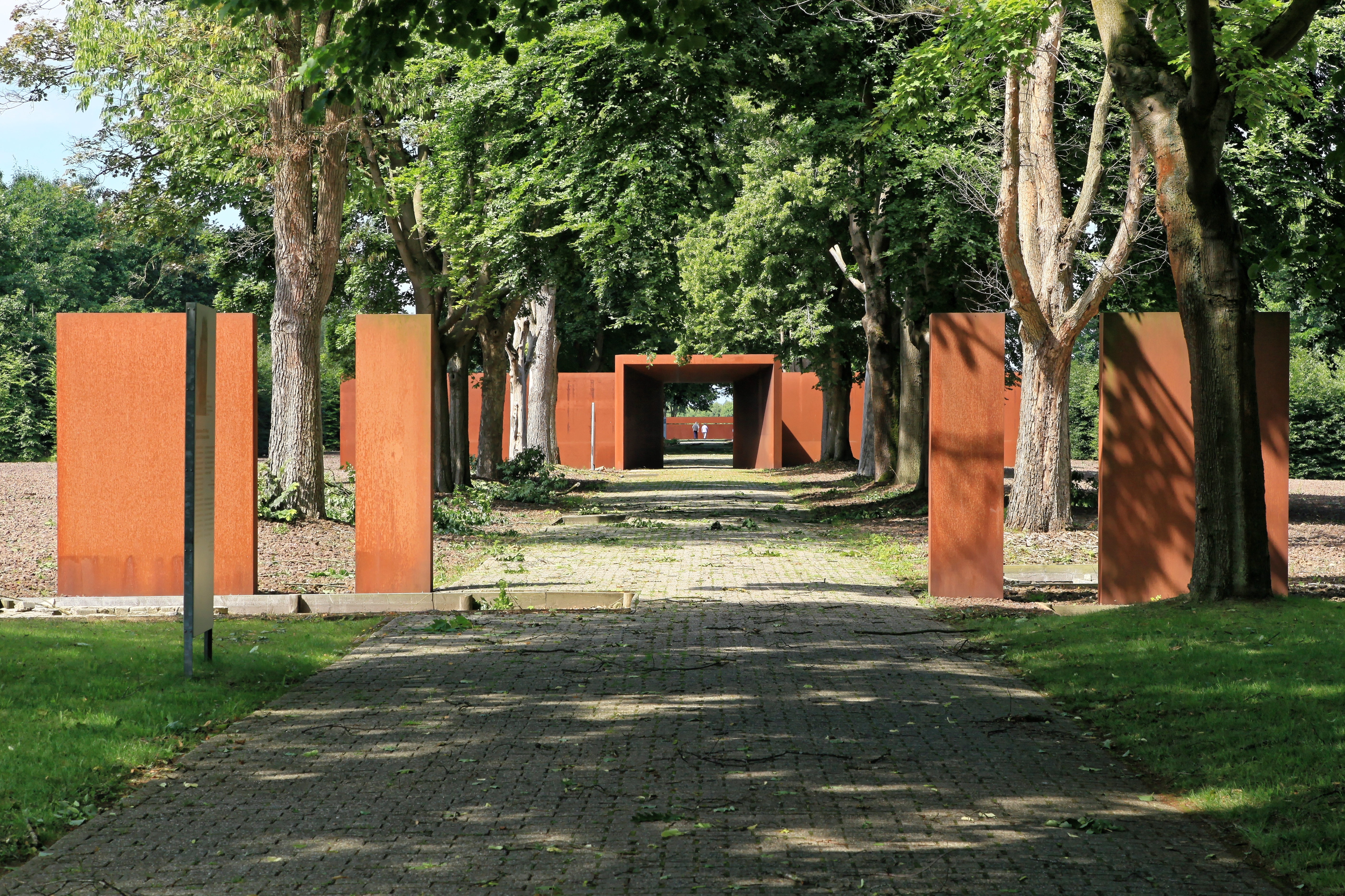 Gedenkstätte Esterwegen, Hinterm Busch in Esterwegen